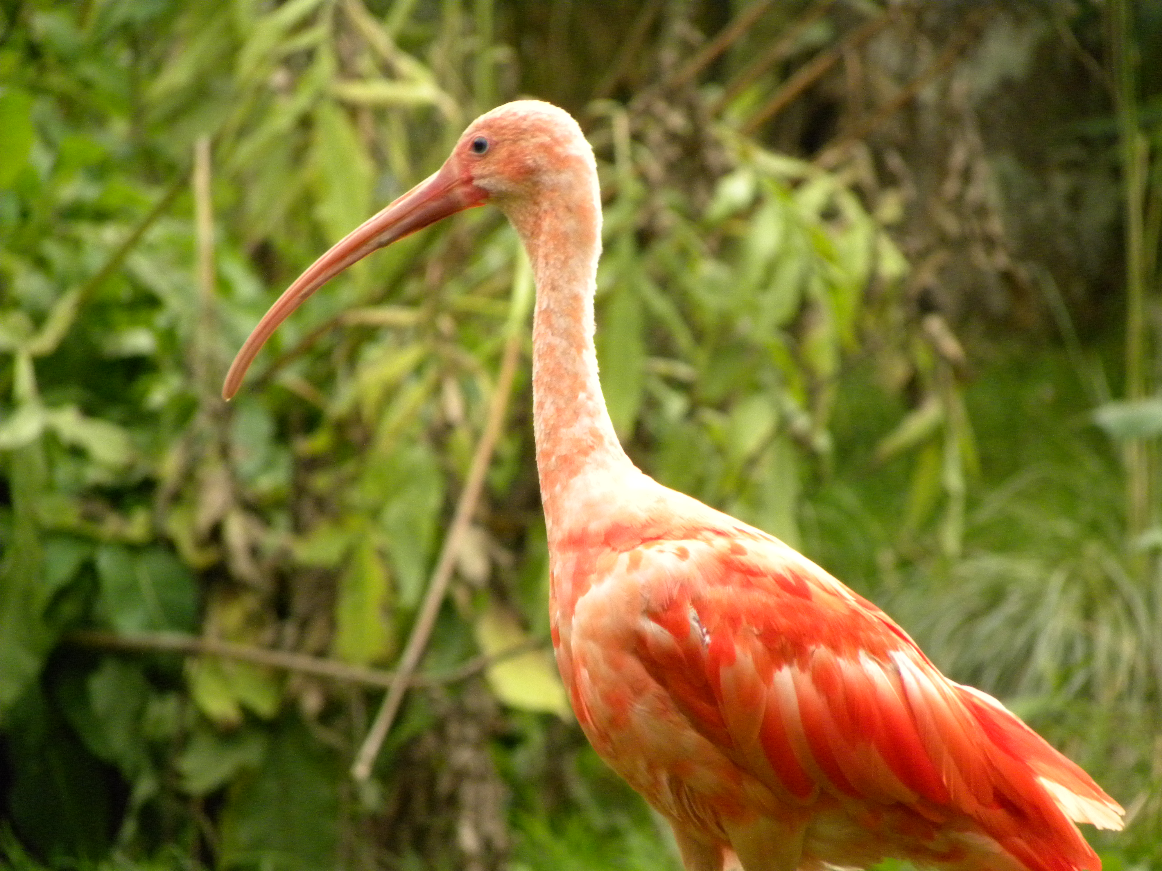 Rode ibis